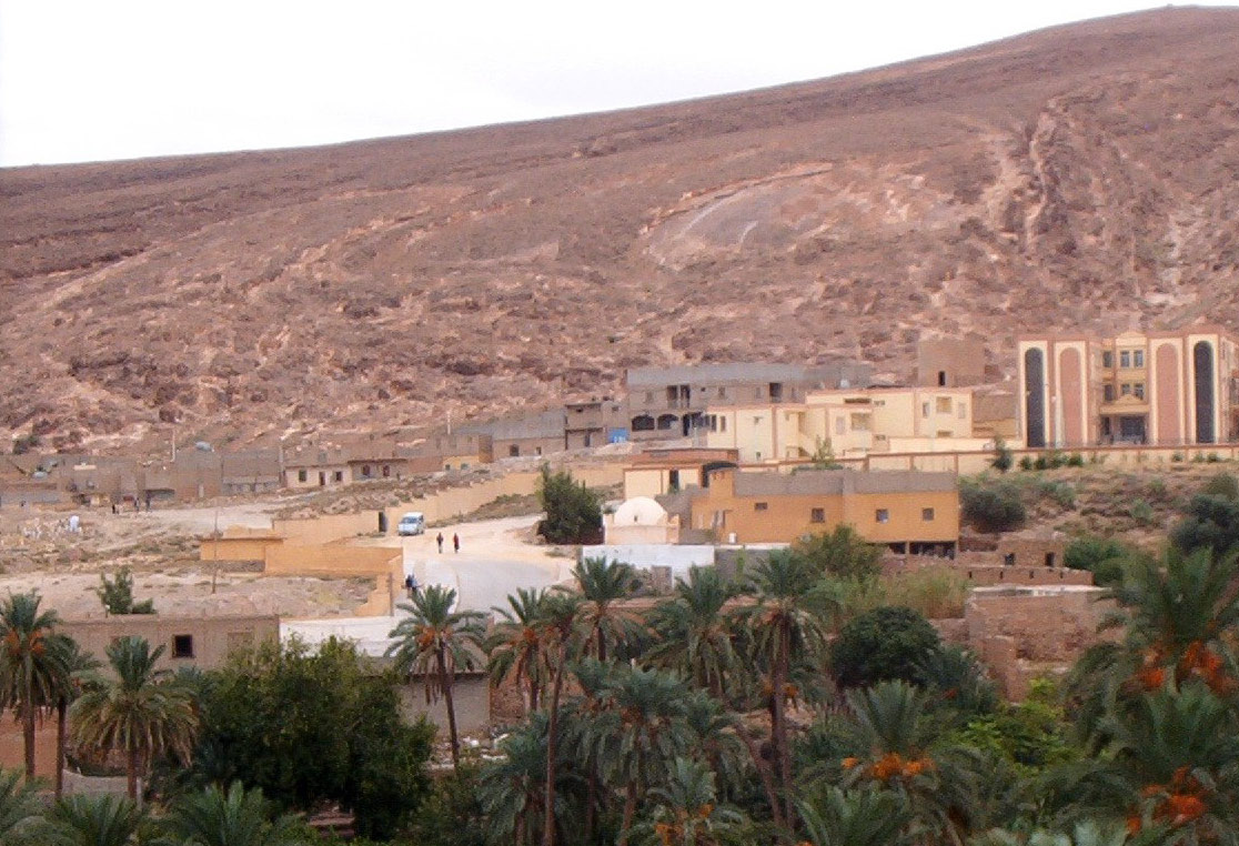 tombeau du peintre Dinet à Bou Saada